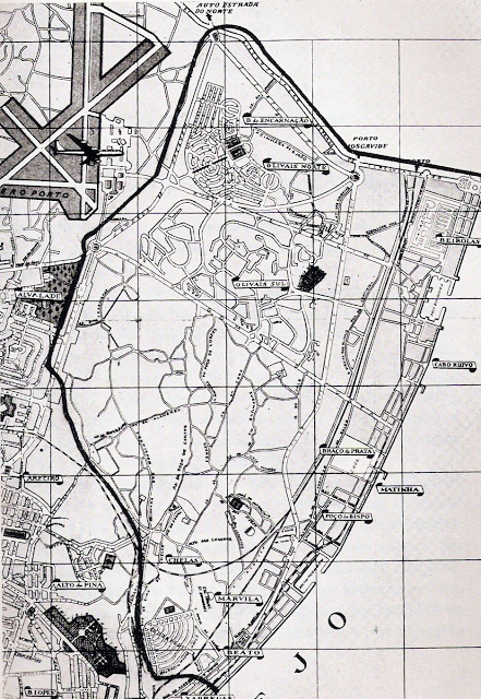 Mapa inserto no livro: A Antiga Freguesia dos Olivais, de Ralph Delgado, correspondente à primitiva área da freguesia dos Olivais.